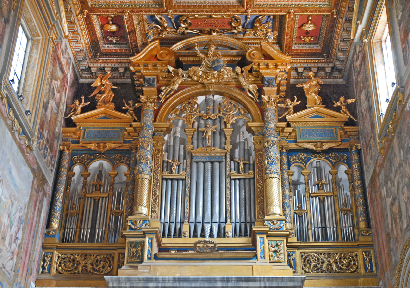 Grandes orgues de la basilique Saint-Jean-de-Latran La basilique Saint-Jean-de-Latran est la cathédrale de Rome, c'est le premier sanctuaire du Christianisme construit sur ce site, dès 312-313, par Constantin, le premier empereur romain devenu chrétien. C'est l'une des quatre basiliques majeures de Rome.